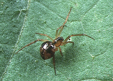 female Coscinida japonica from Okinawa.